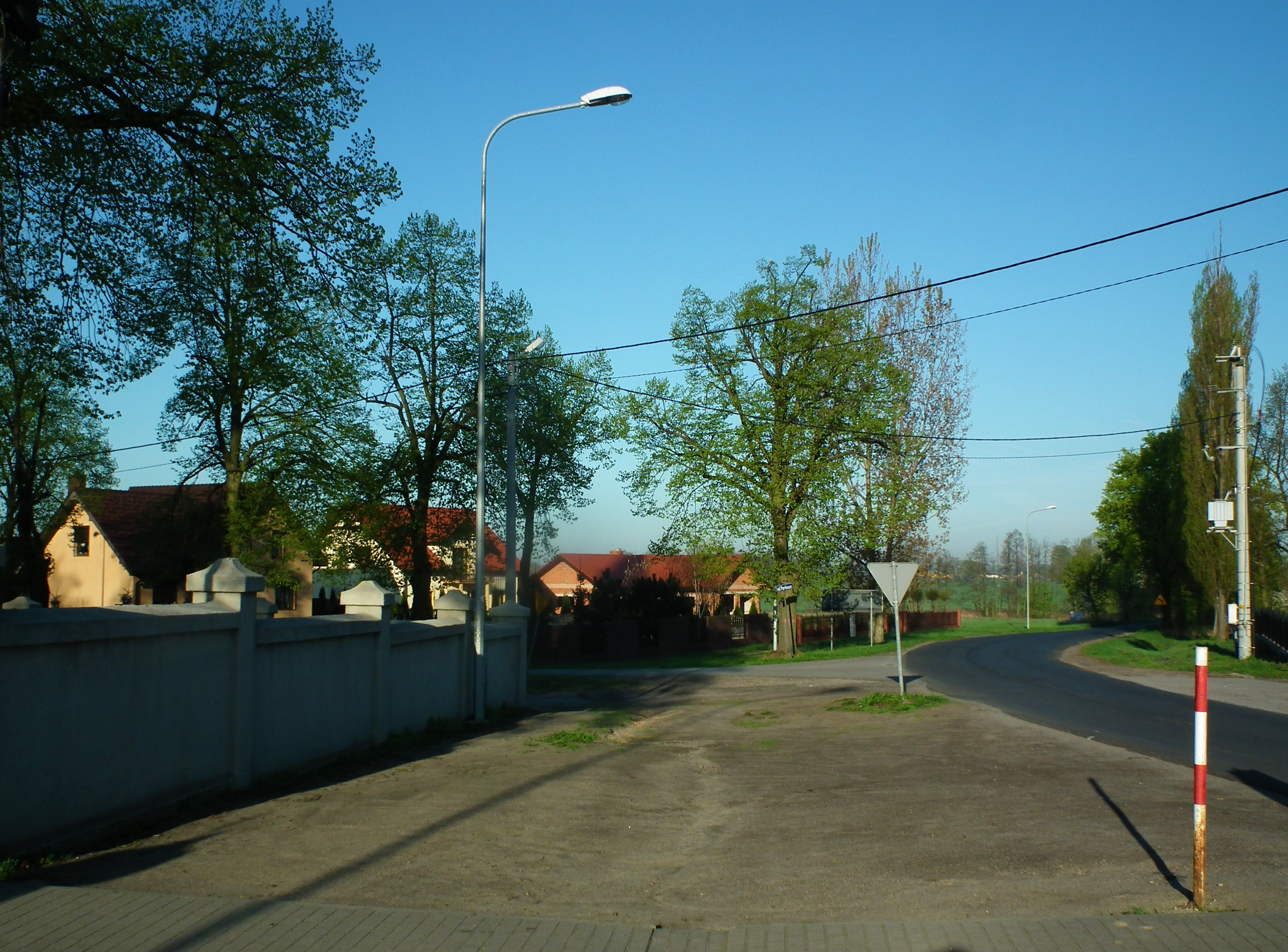 Fragm. wsi Kuczków koło Pleszewa.